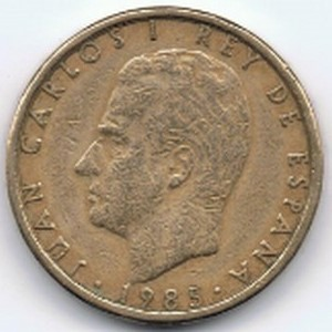 Moneda de Cien Pesetas (1985)